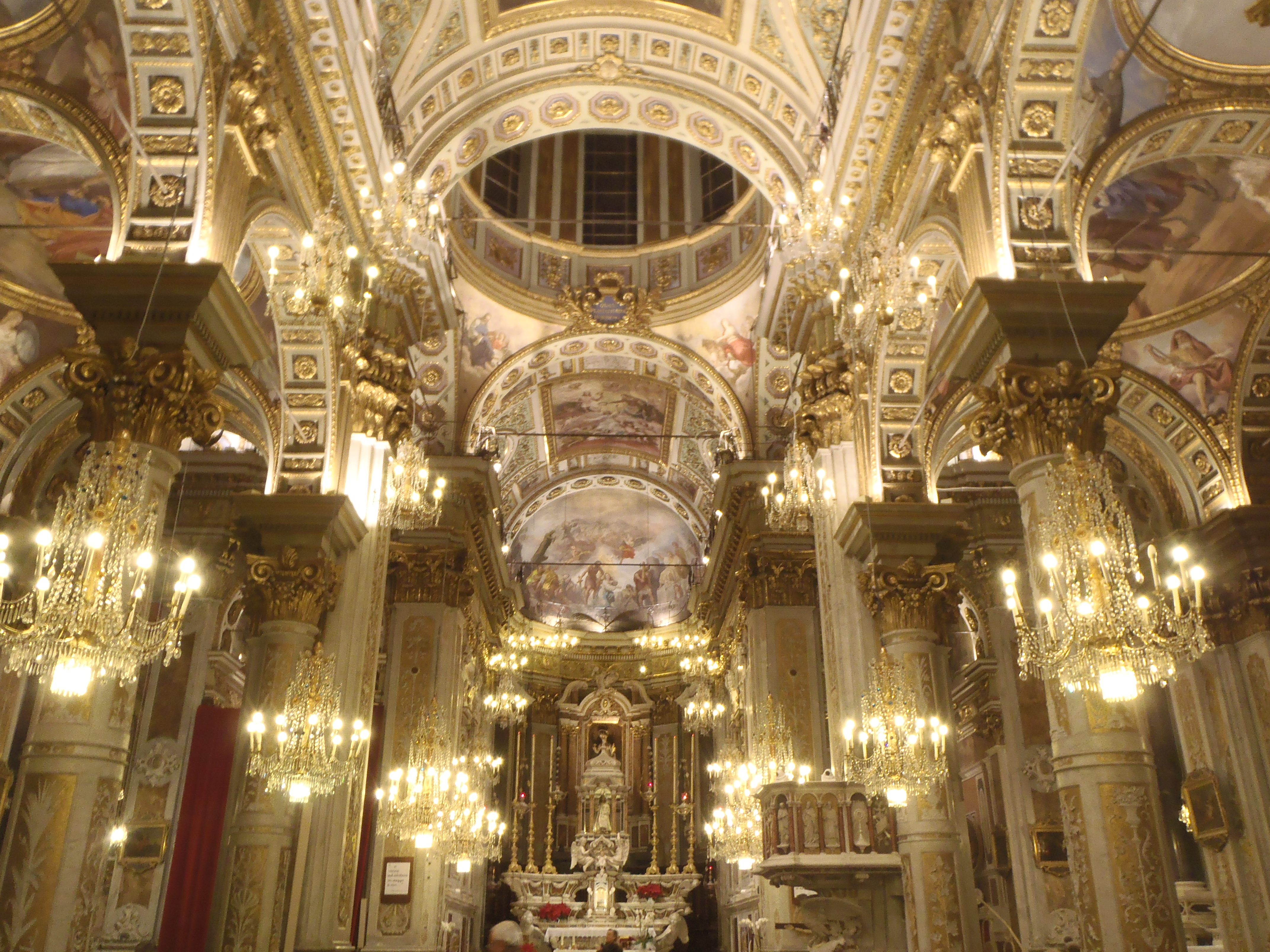 Veduta della chiesa dalla navata centrale più l'accensione generale dell'impianto d'illuminazione nuovo inaugurato nel 2010 circa, basilica di Santa Margherita Ligure, Liguria, Italia